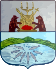 Герб села Паданы Республики Карелия